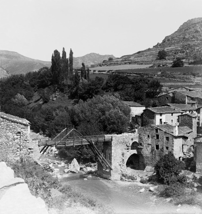 Imatge